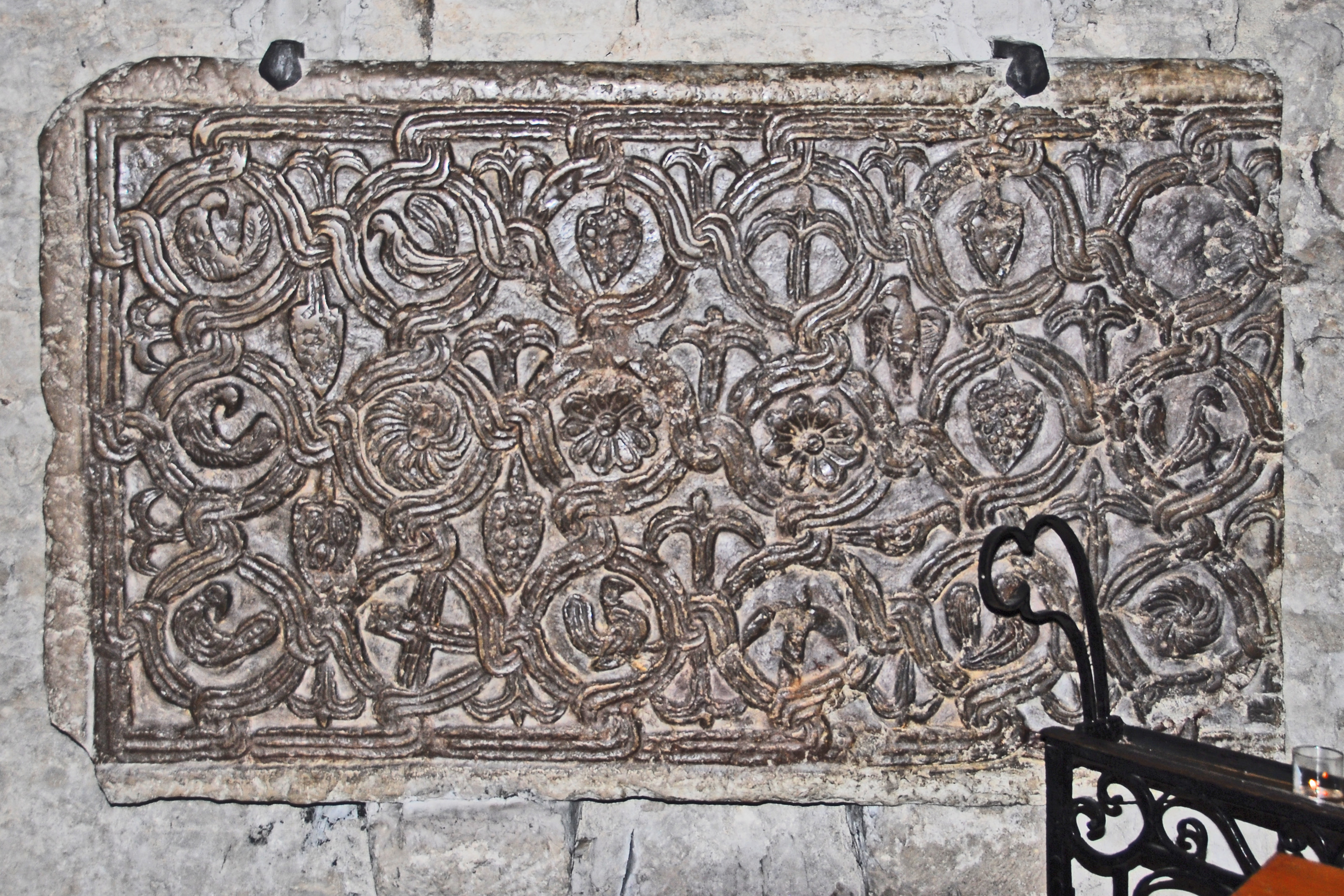 Kathedrale von Vence, merowingisches Flechtwerk